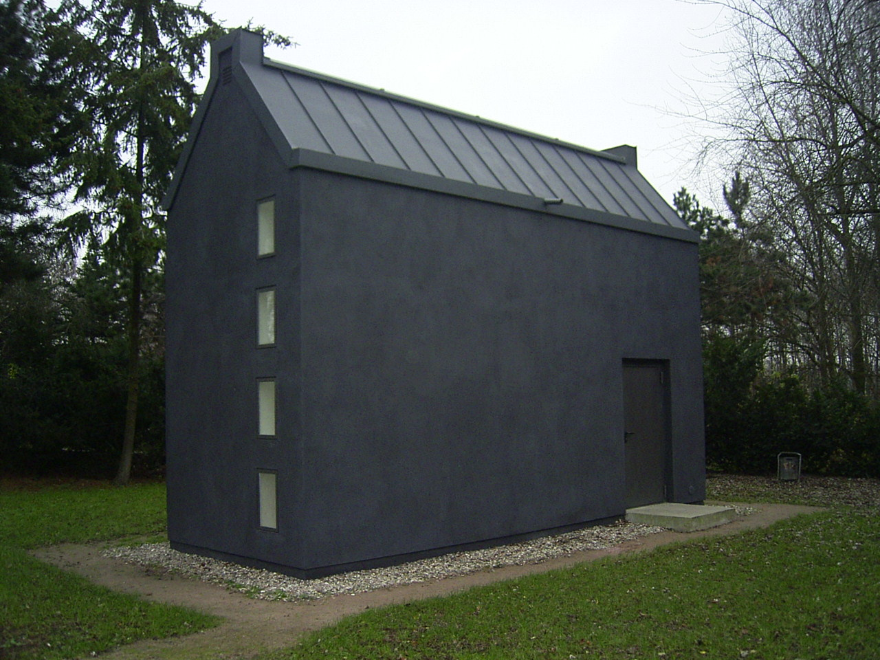 Kriegsopferdenkmal von Volker Lang am Billhorner Deich in Rothenburgsort. Das Denkmal stellt im Maßstab 1:2,5 eines der Terrassenhäuser dar, die für Rothenburgsort bis zur Zerstörung des Stadtteils im II. Weltkrieg typisch waren. Es wurde anläßlich des 60. Jahrestages des Feuersturms (24. - 29. Juli 1943) eingeweiht.